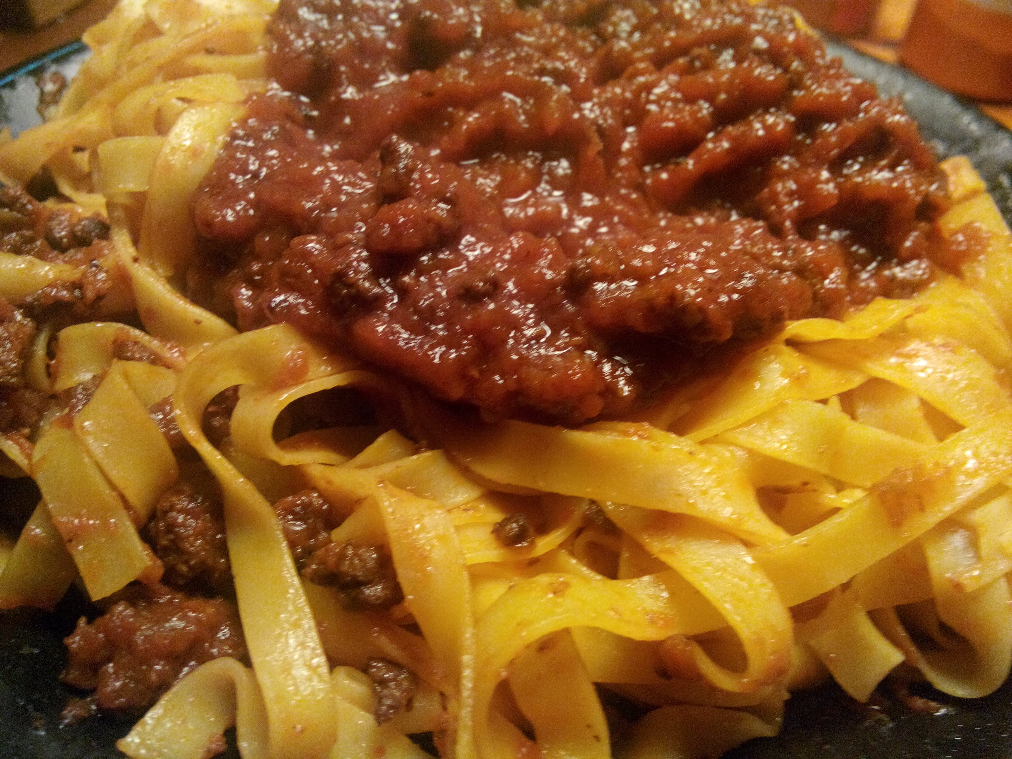 Tagliatelle mit Wildschweinsauce